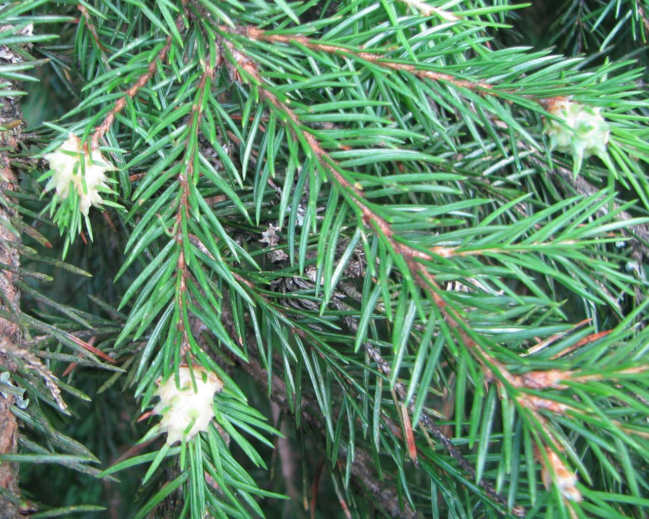 Unge galler av gul grangallelus Sacchiphantes abietis på gran.